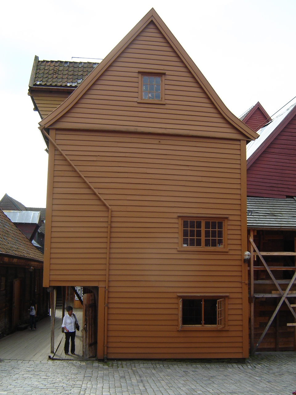 Bryggen in Bergen